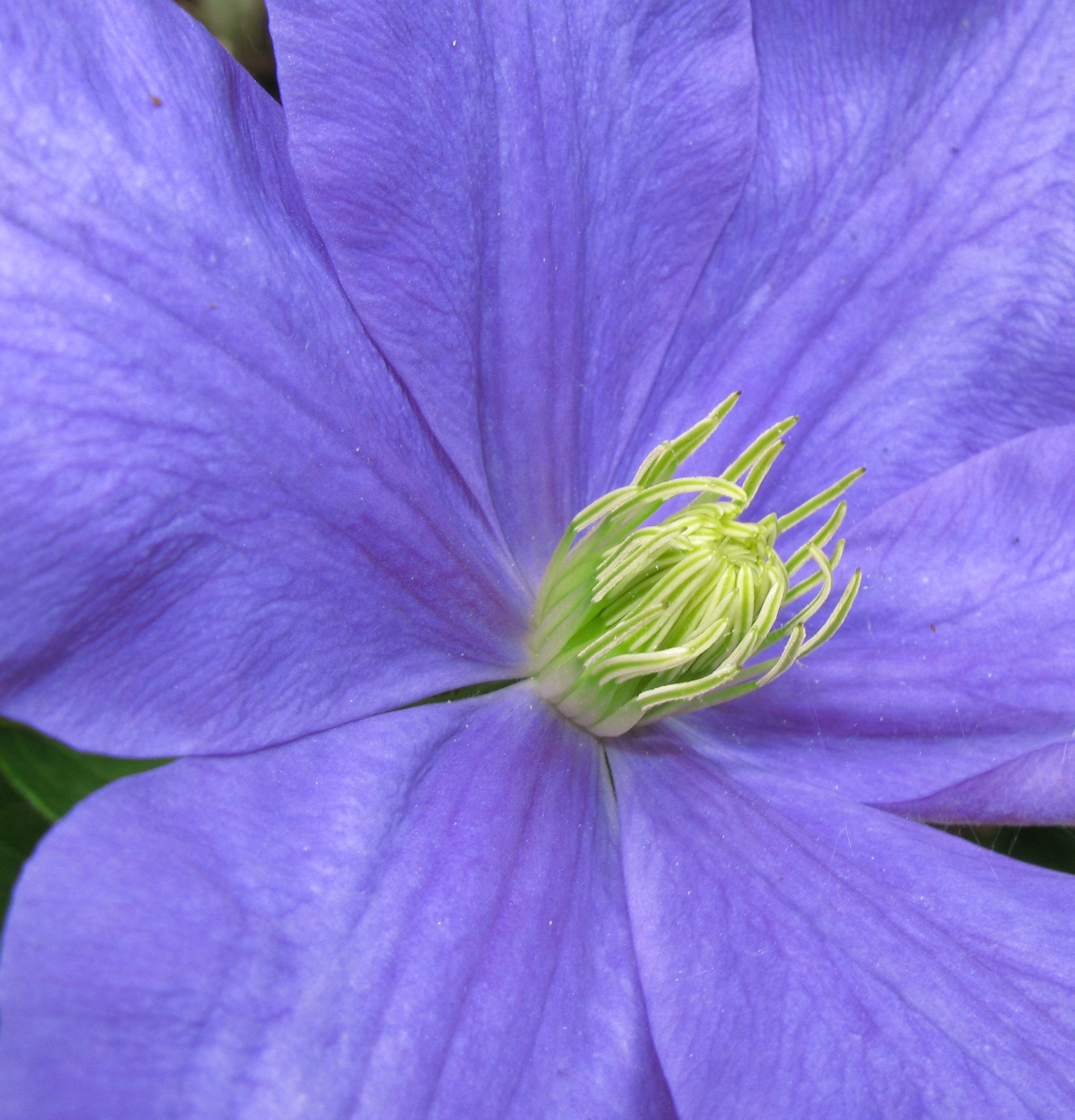 Tsukuba Botanical Garden, Tsukuba-shi(city) Ibaraki-ken(Prefecture), Japan 茨城県つくば市(いばらきけん つくばし) 筑波実験植物園(つくば じっけん しょくぶつえん)